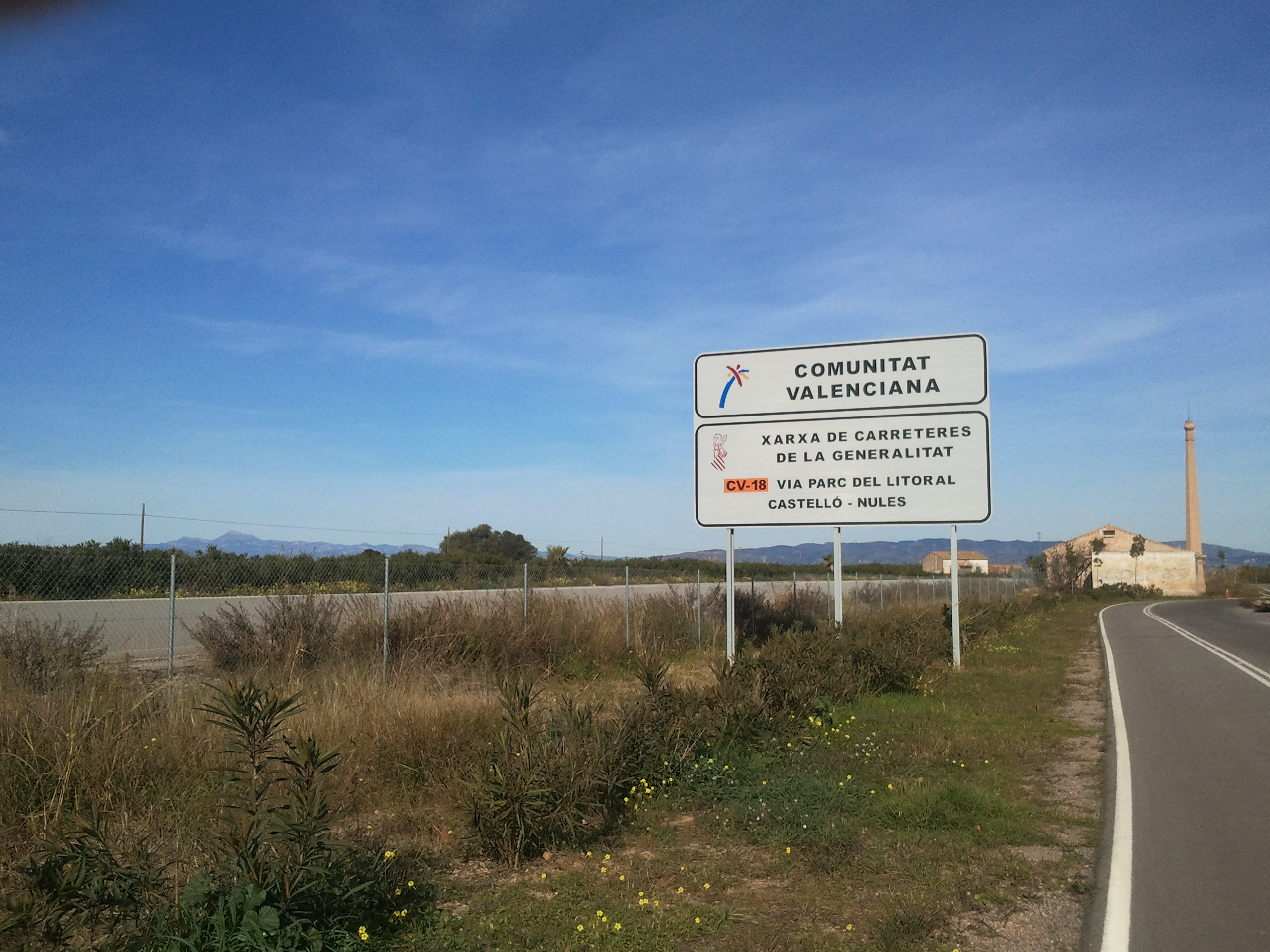 Cartell informatiu de la carretera CV-18.